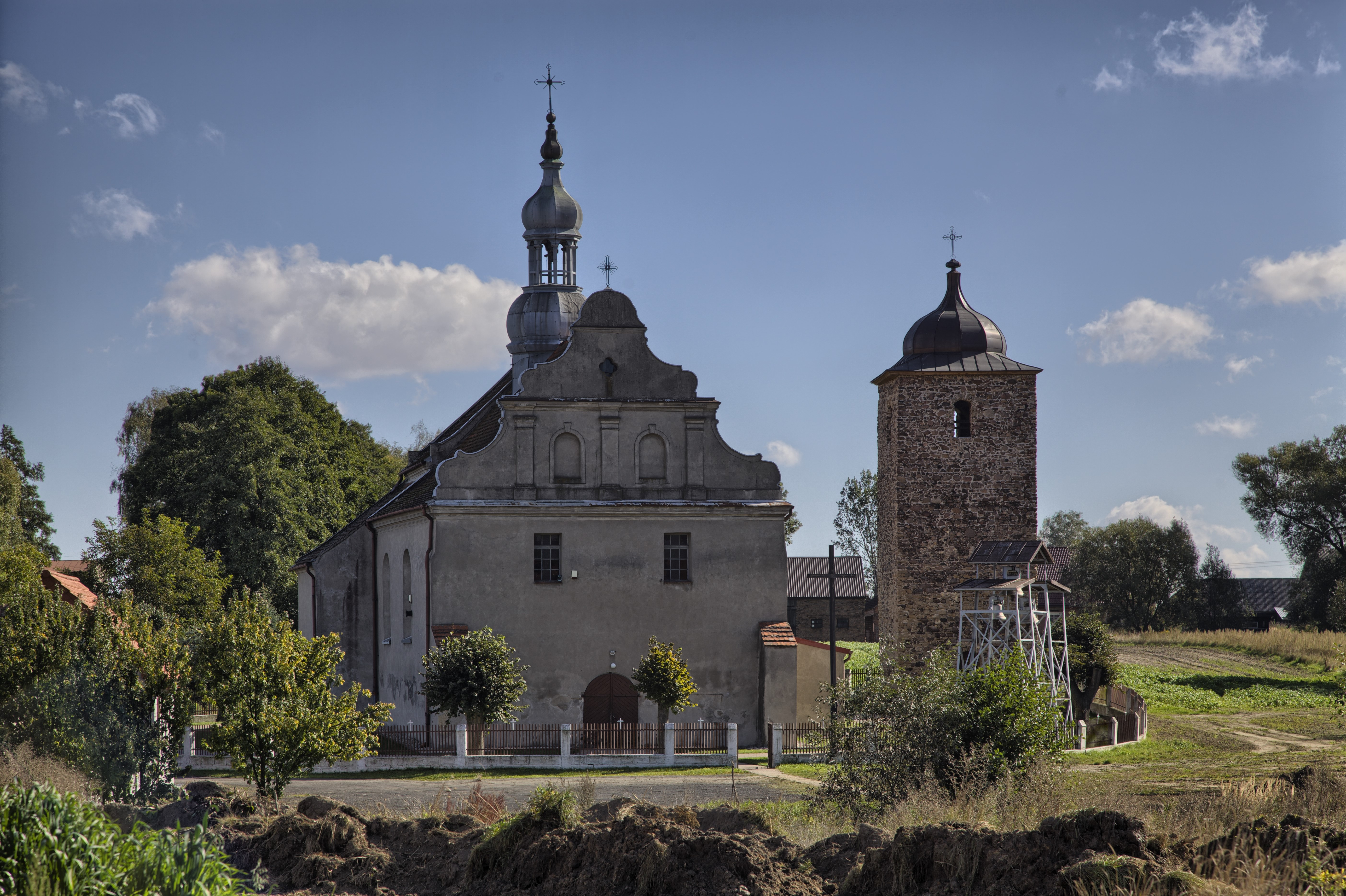 Krzyworzeka, zespół kościoła śś. Piotra i Pawła, XIII, XVIII